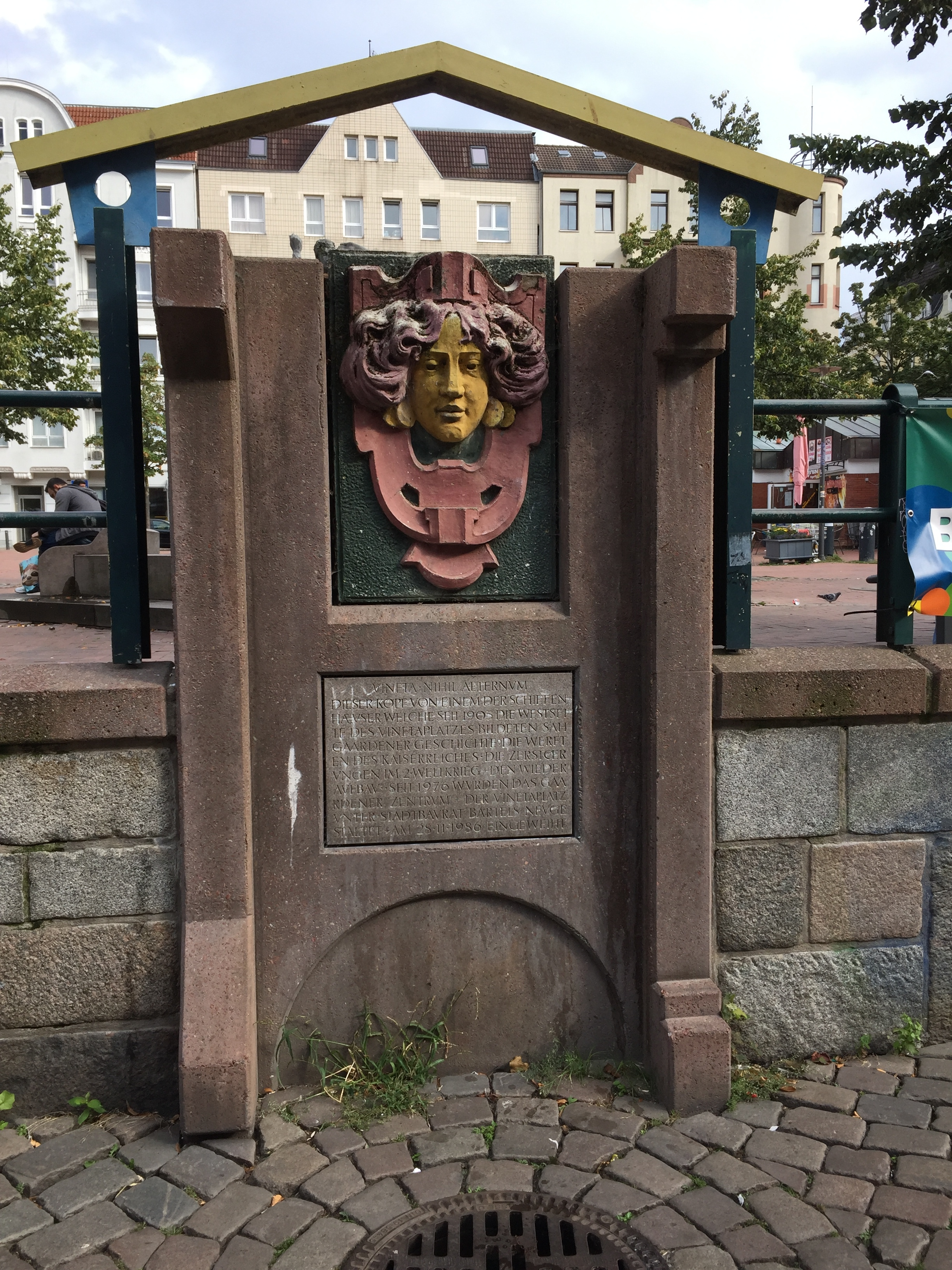 Vinetaplatz Kiel Gaarden